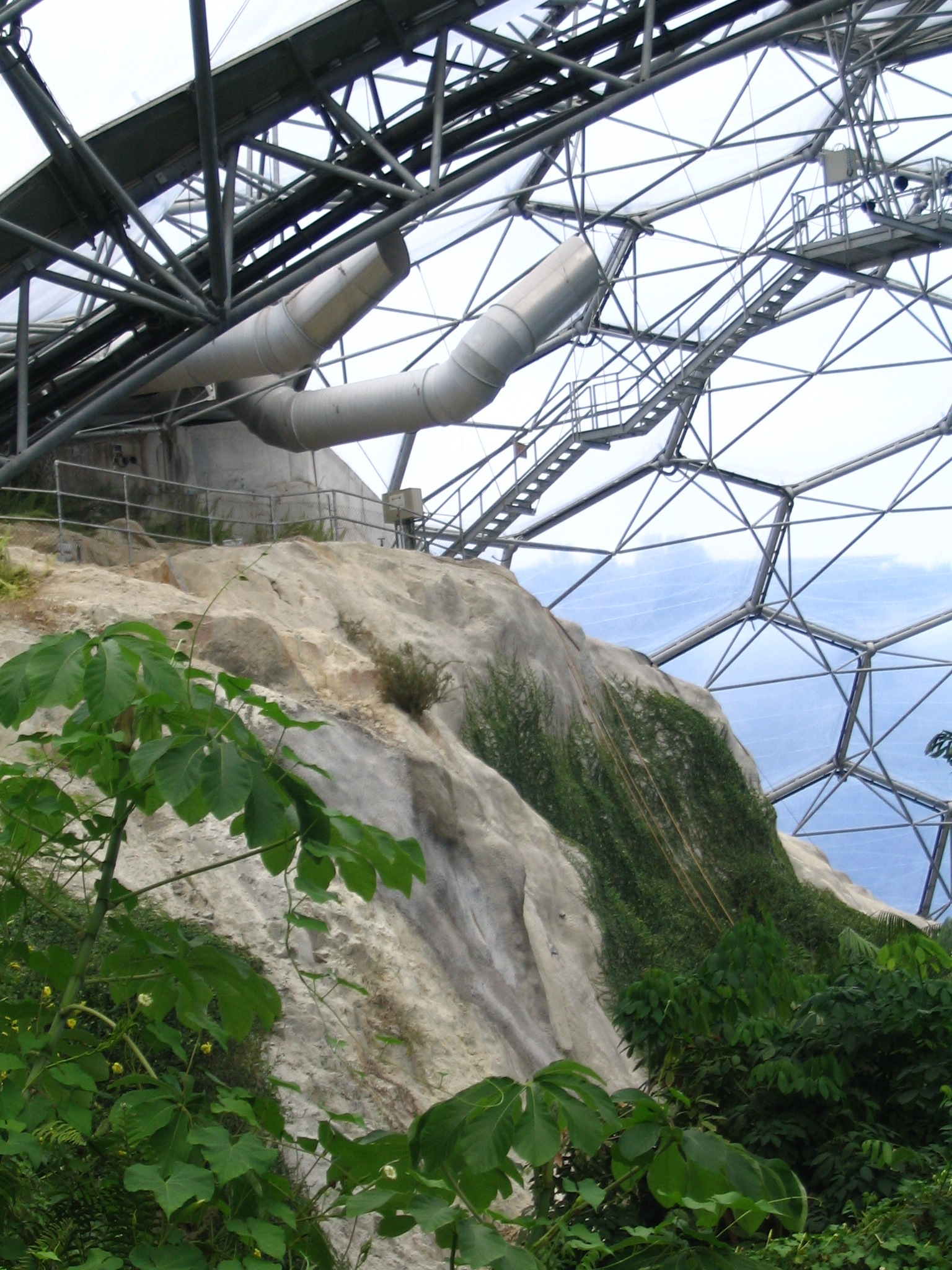 Eden Project vue intérieure du biome humide - Cornouailles - Angleterre Auteur: P.Charpiat - 2006